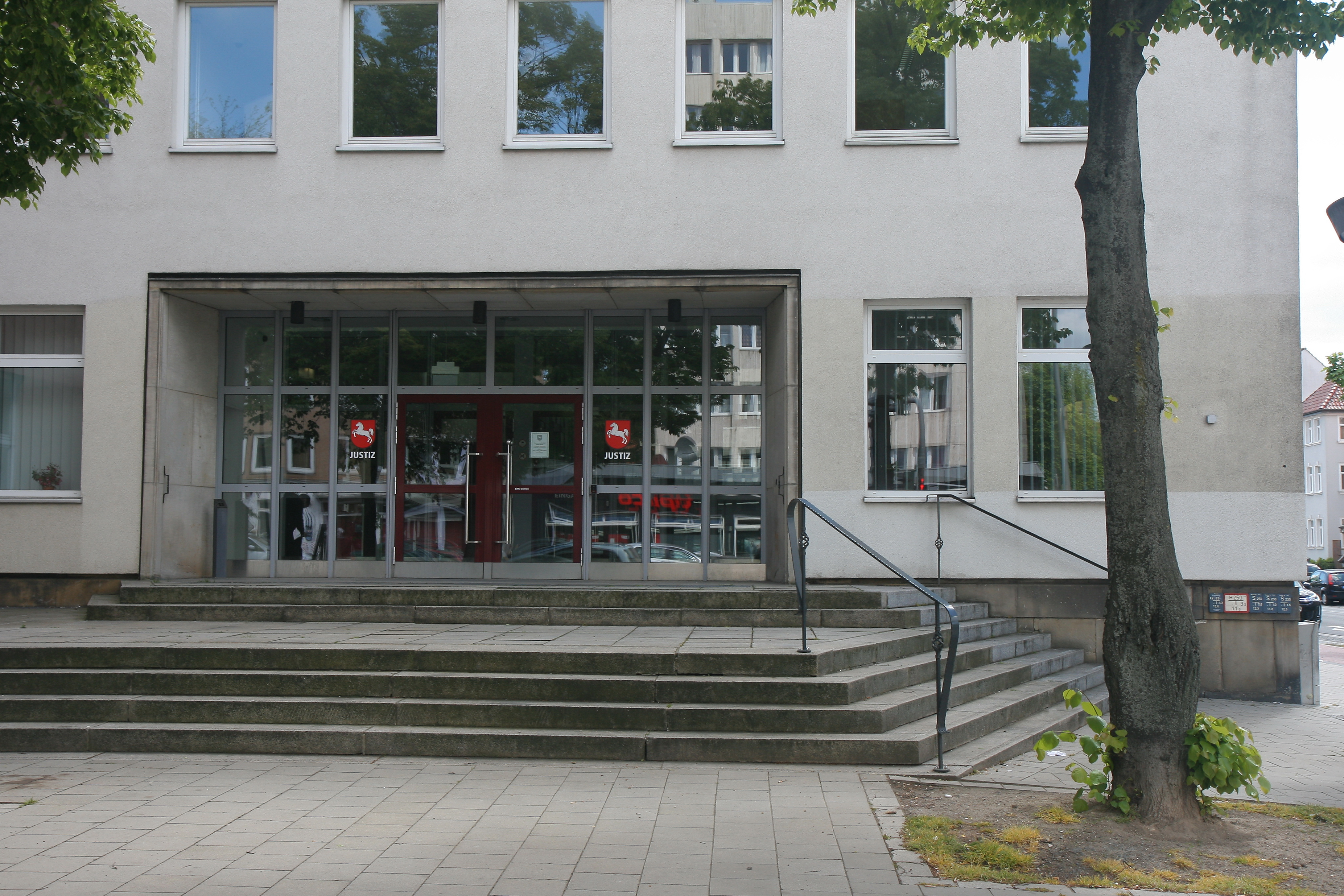 Justizbehörden Hildesheim (Gebäude C), Nebenstellen Bahnhofsallee 37/Kaiserstraße in Hildesheim. Amtsgericht: Zivilprozessabteilung; Landgericht: Wirtschaftsstrafkammern; Staatsanwaltschaft: Wirtschaftsabteilung und Amtsanwaltsabteilung